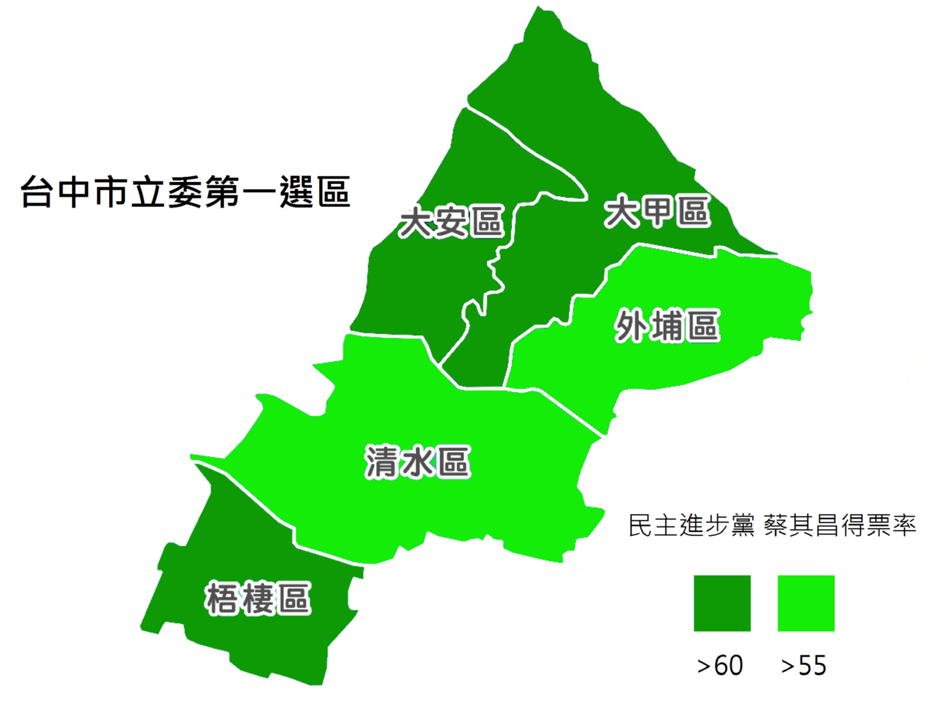 2016年台中第一選區各區得票率